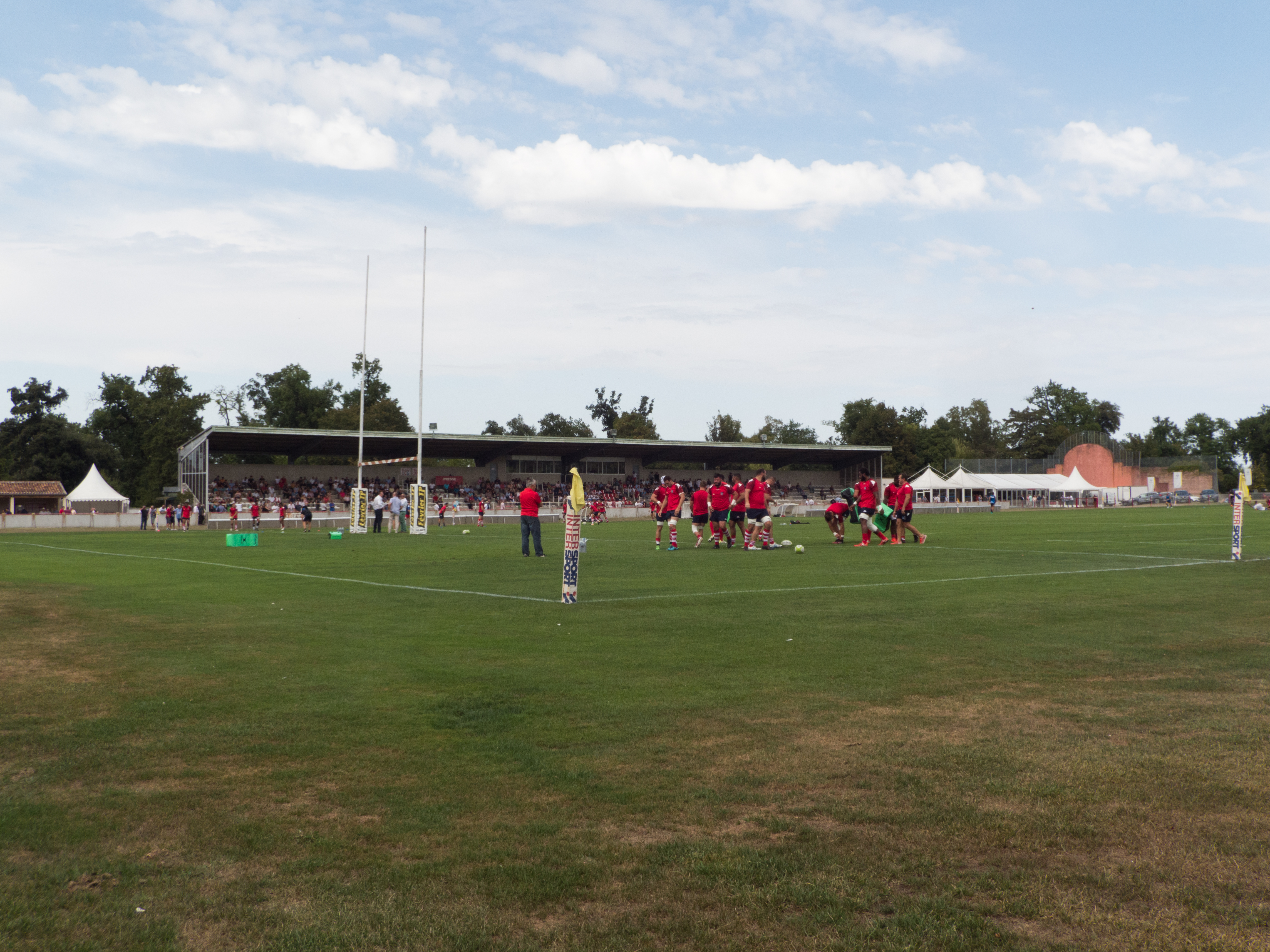 Fédérale 1 2018-2019 — 9 September 2018, parc des sports de Cognac. Match between: Q32790180 — US Dax